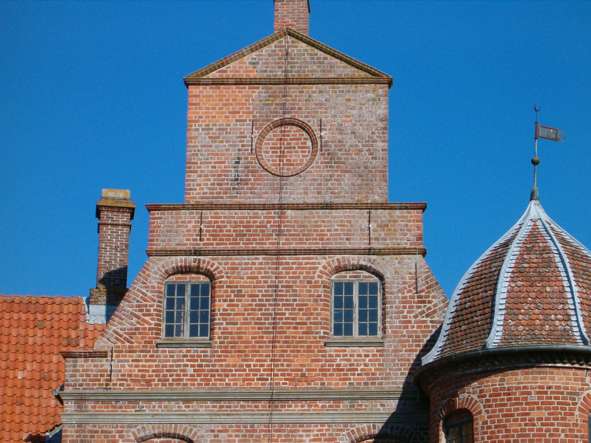 Gavl på Rosenholm / Rosenholm Castle, Jutland, Denmark